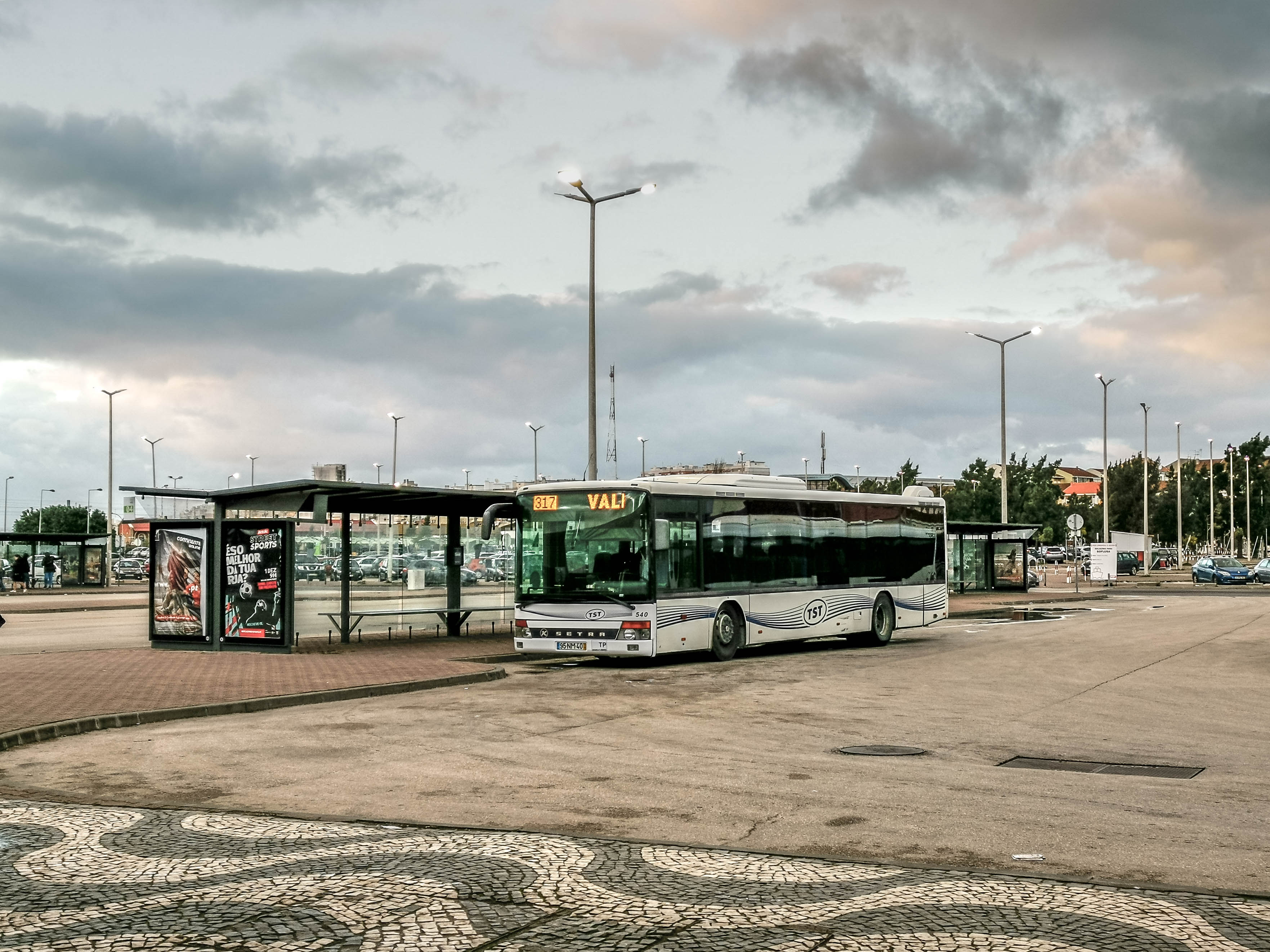 Veículo da TST parqueado no Barreiro.